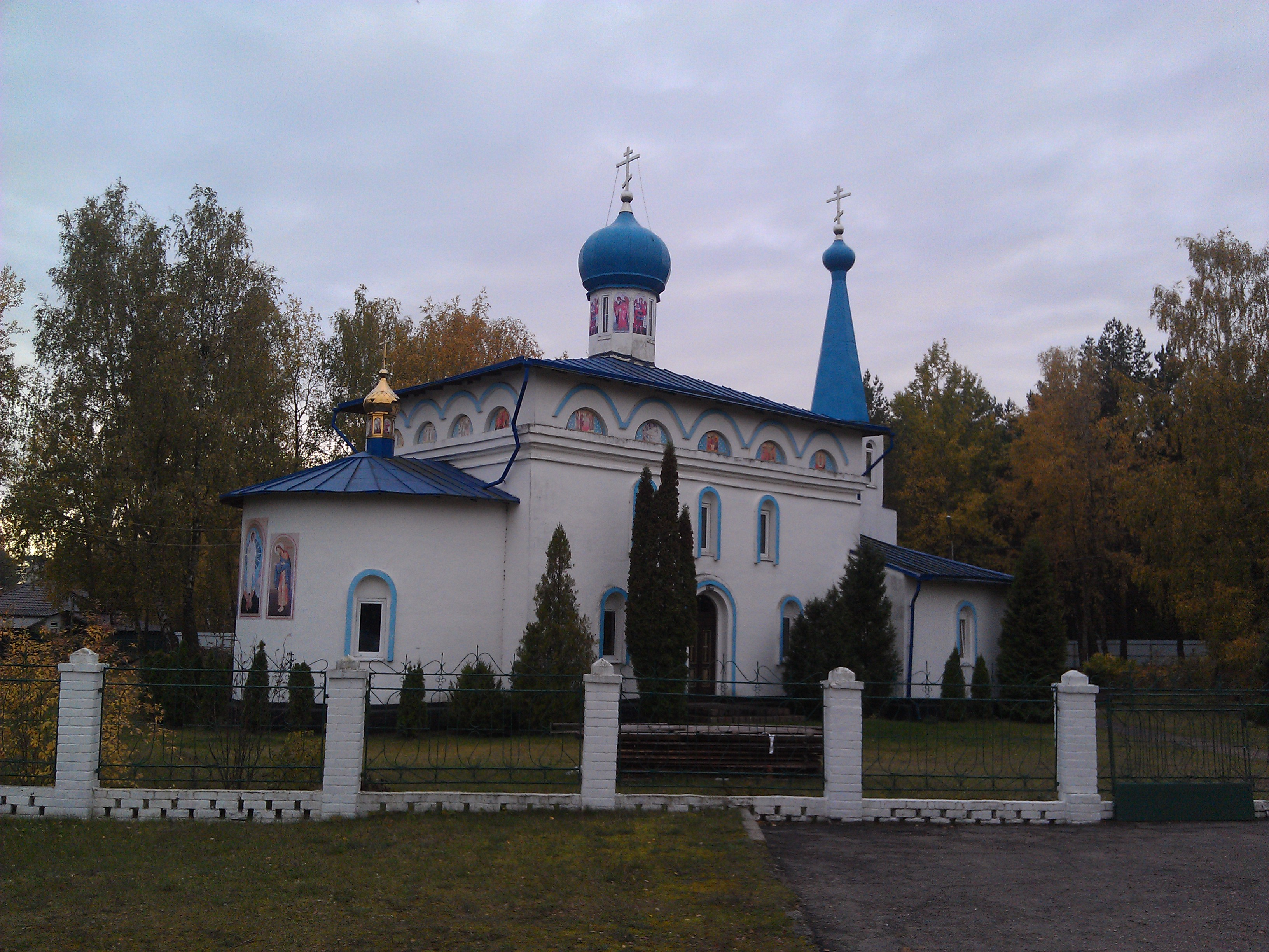 Вид на храм Благовещения Богородицы с северо-востока